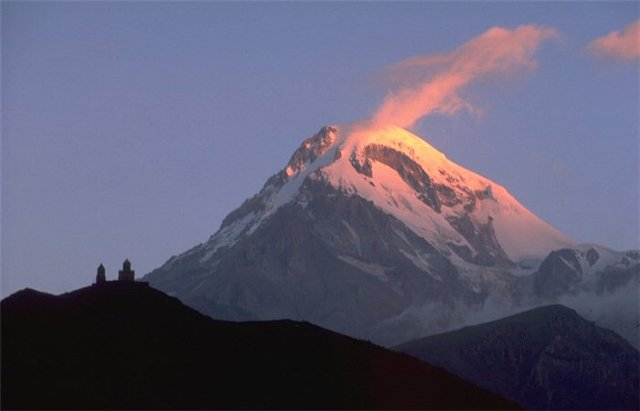 მყინვარწვერი